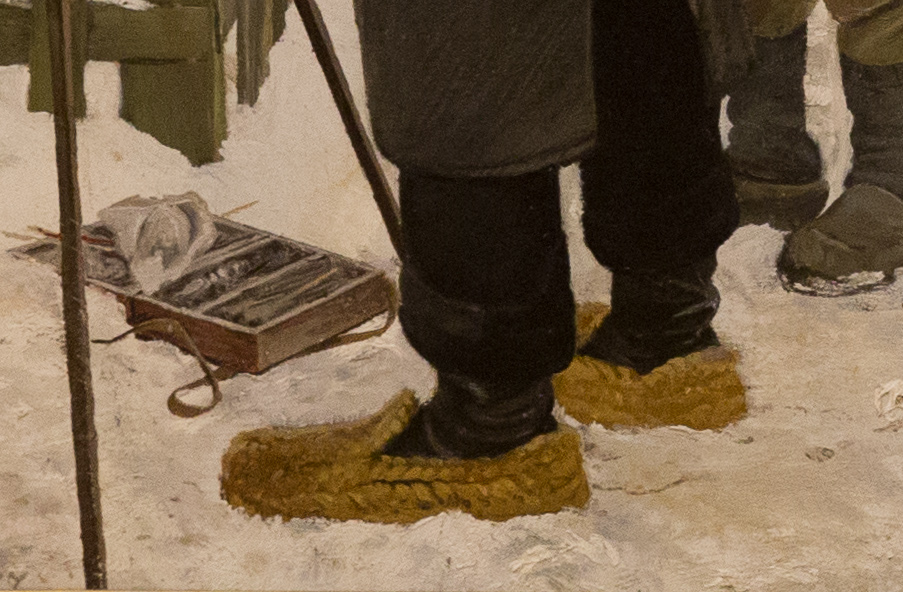 Maleren i landsbyen (« Le peintre dans le village »), huile sur toile de Laurits Andersen Ring, peintre symboliste danois.